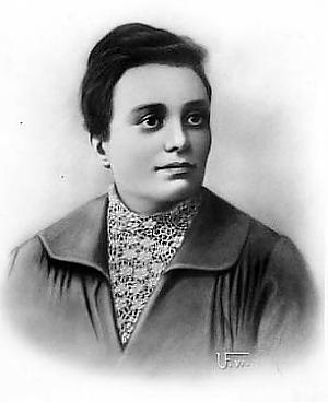 Rosa Maltoni, madre di Benito Mussolni.